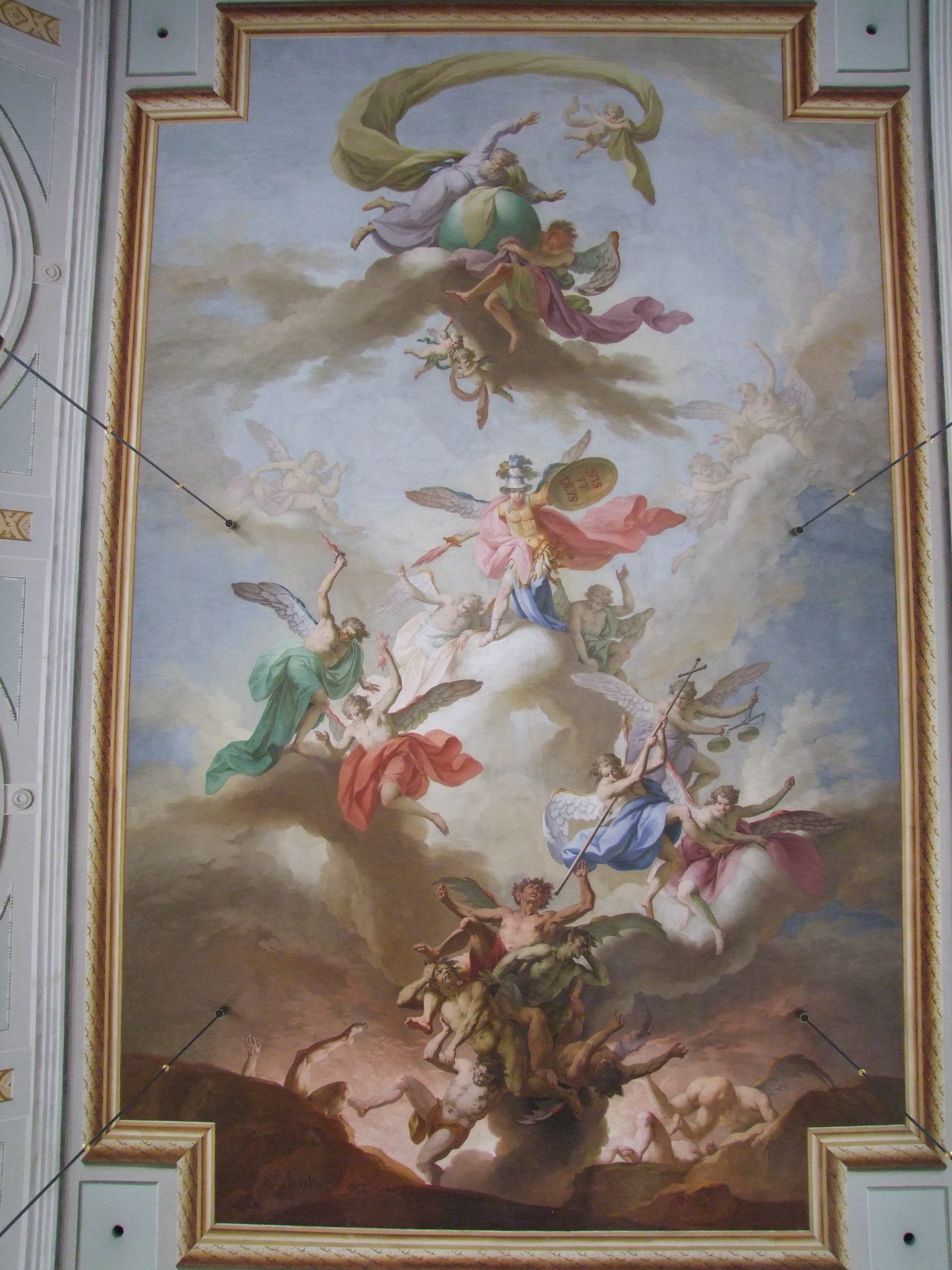 St. Michael in Stockach in Schwaben